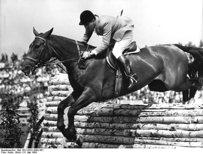 Zentralbild/Kohls 31.5.64 Berlin: Olympia-Ausscheidungskämpfe im Springreiten Im Rad- und Reitstadion in Berlin-Weißensee begannen am Vormittag des 31.5. mit dem ersten Umlauf der Springreiter die Olympia-Ausscheidungen zur Aufstellung einer gemeinsamen deutschen Reitermannschaft für die Olympischen Spiele 1960 in Tokio. Ubz: Der 37jährige Hans-Günter Winkler (Westdeutschland) auf "Fidelitas" (10 Jahre) beim 11. Hindernis, die Birkenmauer